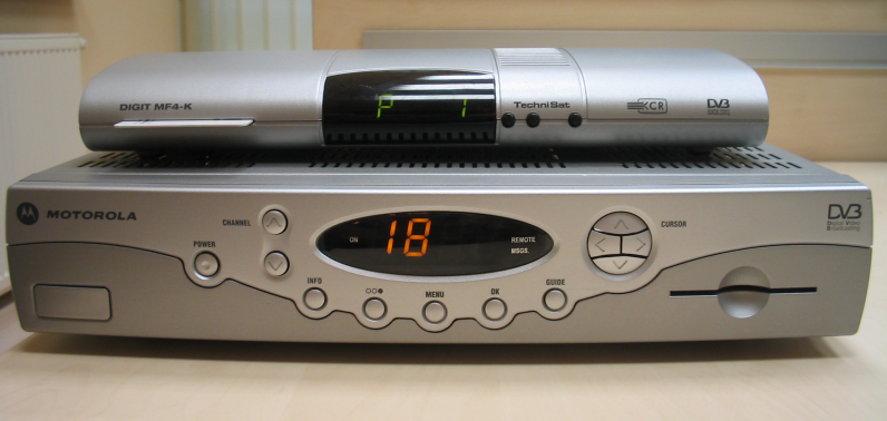 Dwa STB zgodne z DVB-C